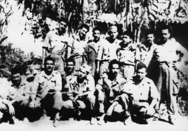 État-major de la wilaya 4 de l'ALN, 1956-1957. — Debouts, de droite à gauche : Amar Ouamrane, Rachid Gourine (dit Max Lejeune), Mustapha Khodja (dit Ali Khodja), Smaïl Abdesslami (dit Si Smaïl), Saïd Mokrani (dit Si Lakhdar), Ahmed Bouguerra (dit Si M'hamed) et Mohammed Zaamoum (dit Si Salah). — Accroupis, de droite à gauche : Abdellah Berbar, Abderrahmane Laâla, Mohamed Ferradj, Hocine le Boucher, Abdelkader Kebdi et un combattant non identifié. (Raphaëlle Branche, L’embuscade de Palestro : Algérie 1956, Armand Colin, 2010, p. 22.)